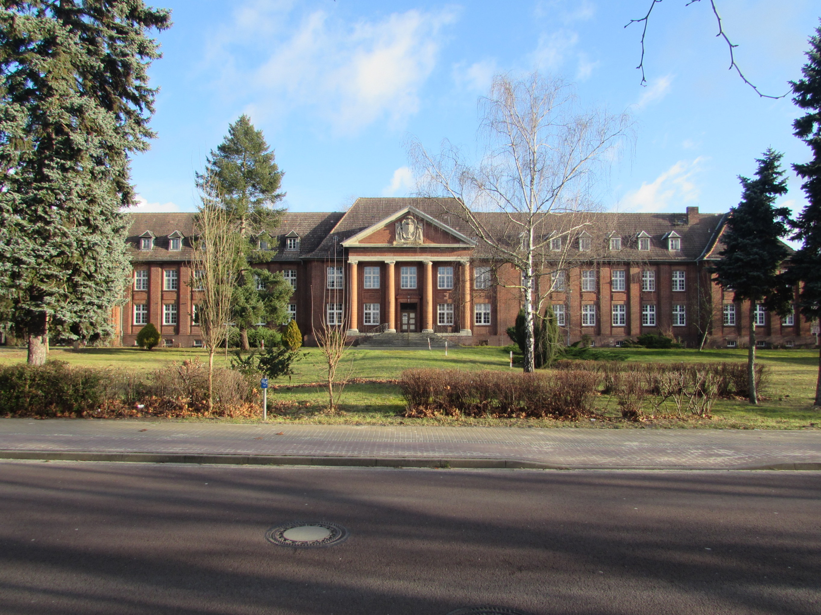 krankenhaus kirchmöser, zweigstelle des städtischen klinikums brandenburg, vorher hauptverwaltung der pulverfabrik